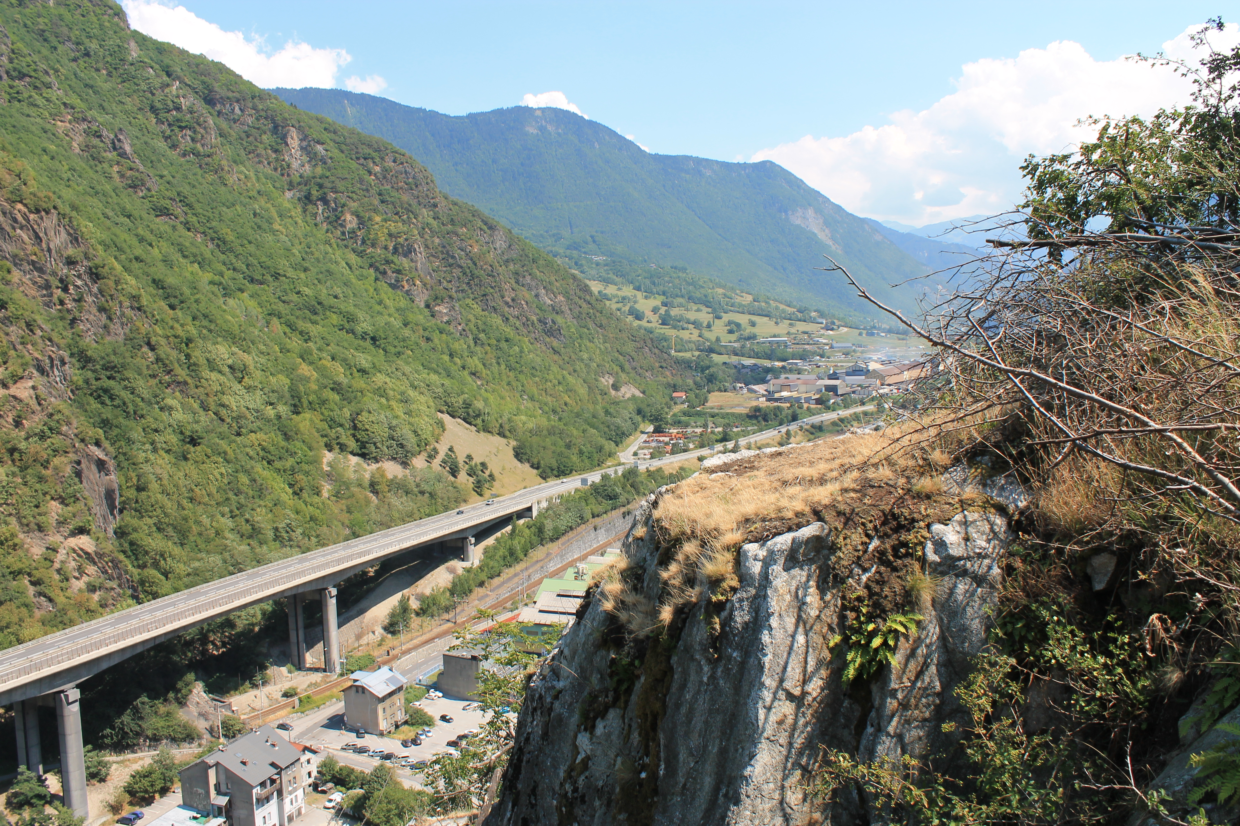 Viaduc du Champ-du-Comte (à gauche) et en arrière-plan l'usine FERROPEM de Chateau-Feuillet, vue depuis le château de Briançon (été 2018).